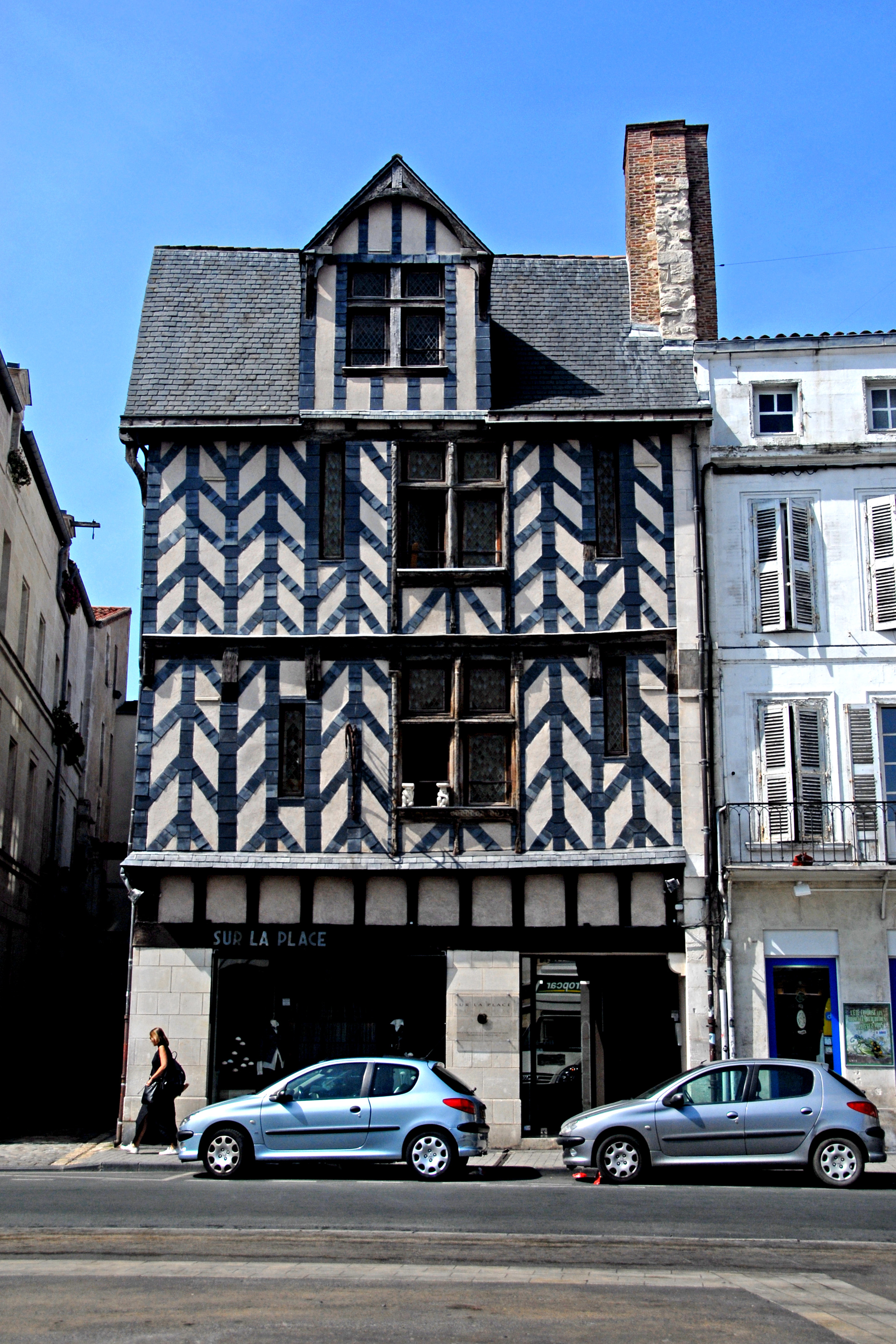 La Rochelle, Fachwerk, fast bretonisch